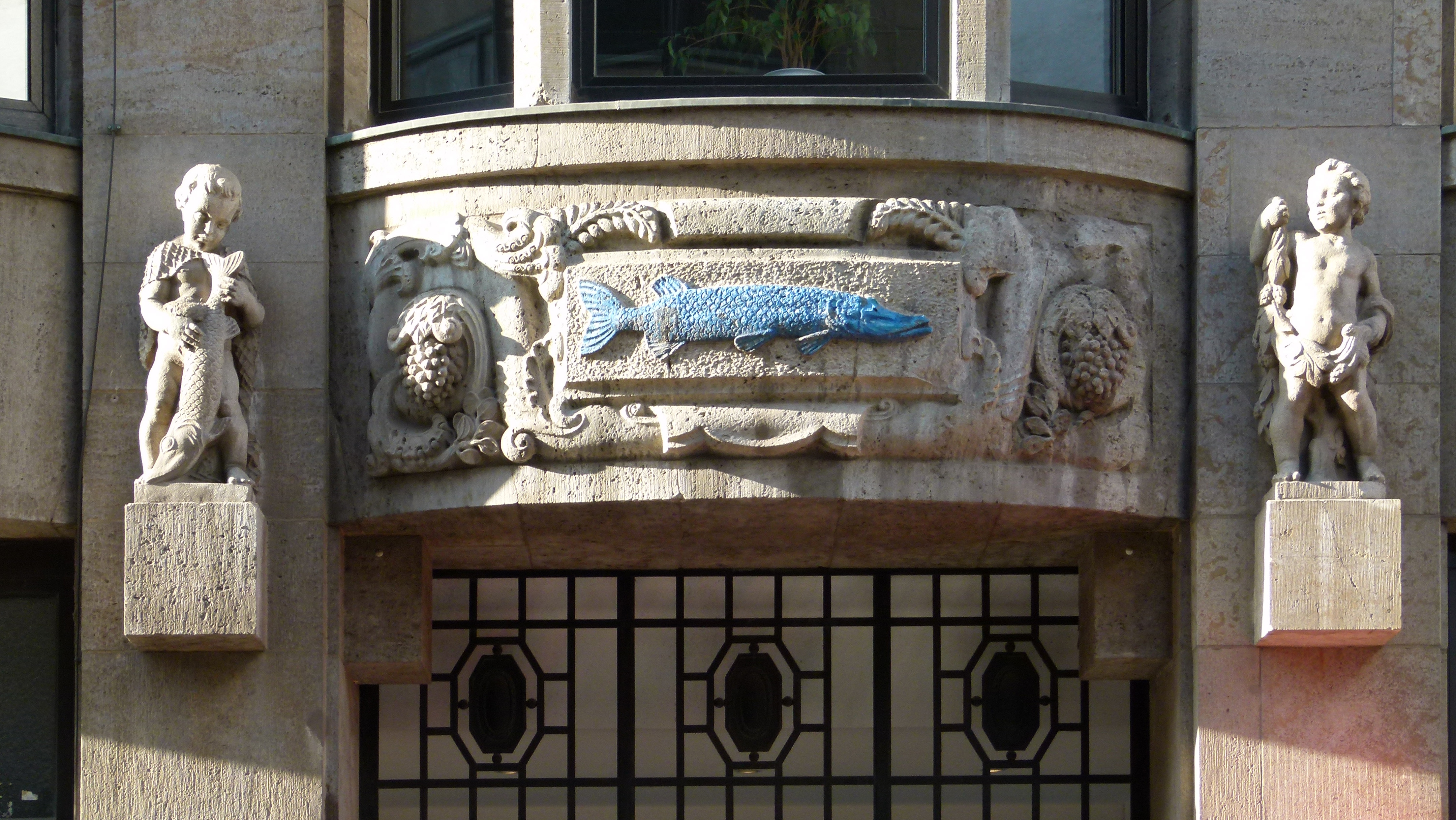 Denkmalgeschütztes Geschäftshaus, Detail, Nikolaistraße 39-45, Leipzig